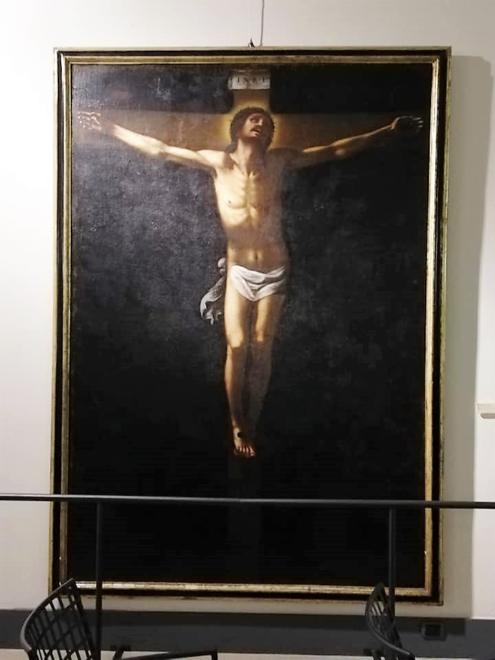 Gesù Cristo crocifisso, olio su tela, Mario Minniti, 1629.